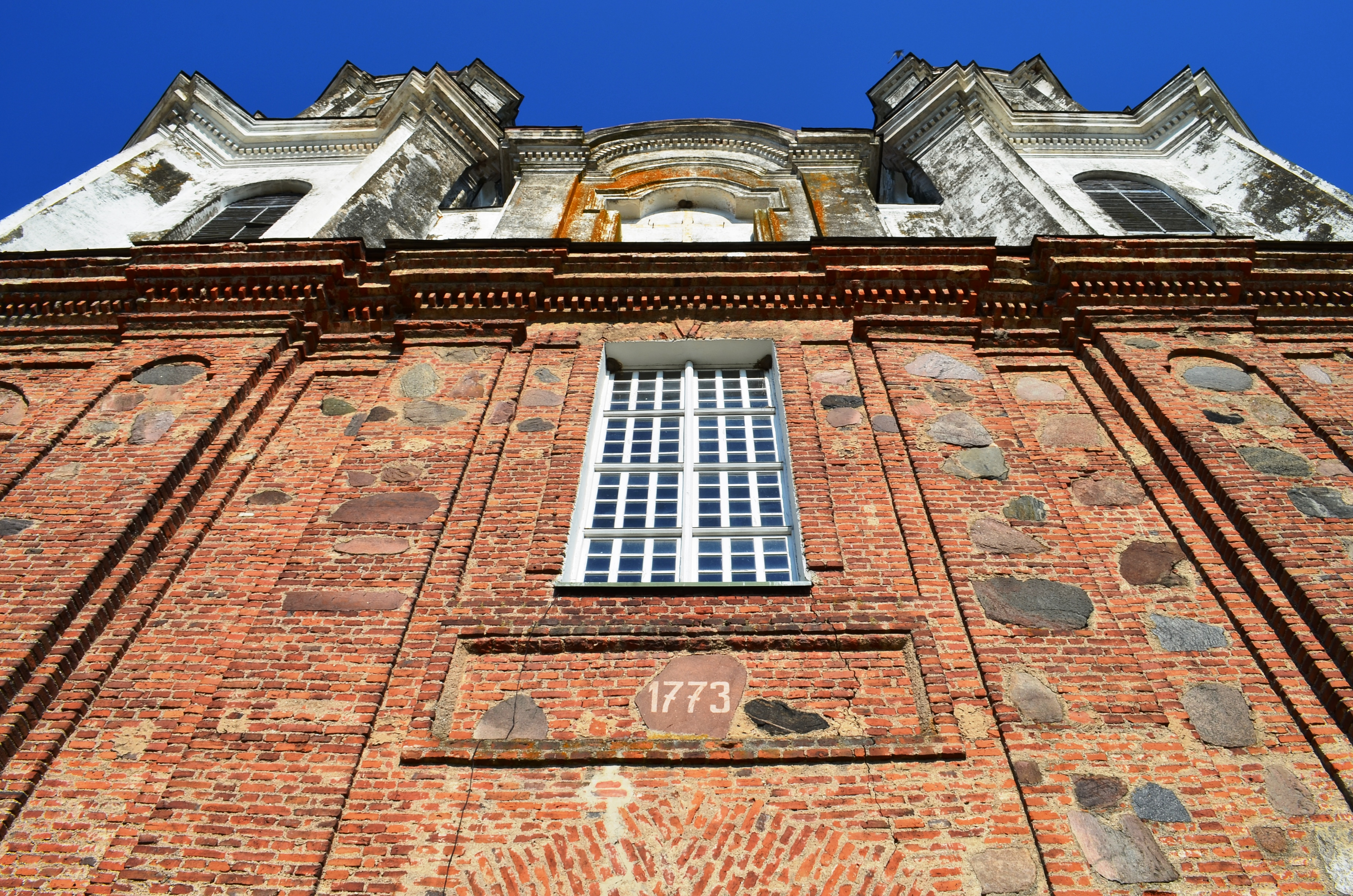 Dotnuvos bažnyčia, Kėdainių raj.